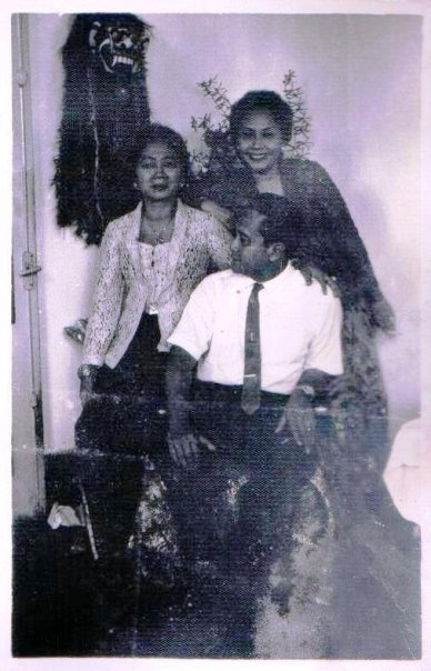 Male dan Istri-istri